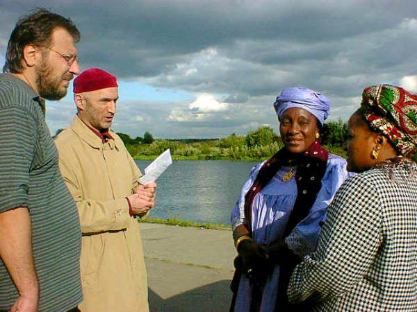 Назим Надиров (второй слева) на съёмках интервью с послом Сьерра-Леоне в России г-жой Мелроуз Кай-Банья (вторая справа). Москва, август 2002.